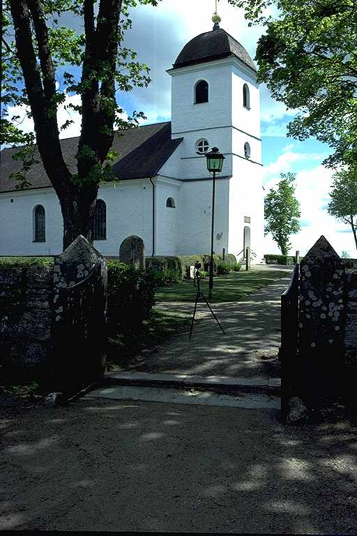 Del av kyrkan från nordväst. Runstenen Ög8 Kälvesten finns vid kyrkan. Kamera och stativ står på grusgången. Motiv: Västra Stenby kyrka Kategori: (01) ExteriörerDel av kyrkan från nordväst. Runstenen Ög8 Kälvesten finns vid kyrkan. Kamera och stativ står på grusgången.